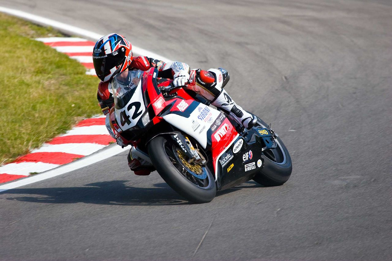 Dean Ellison